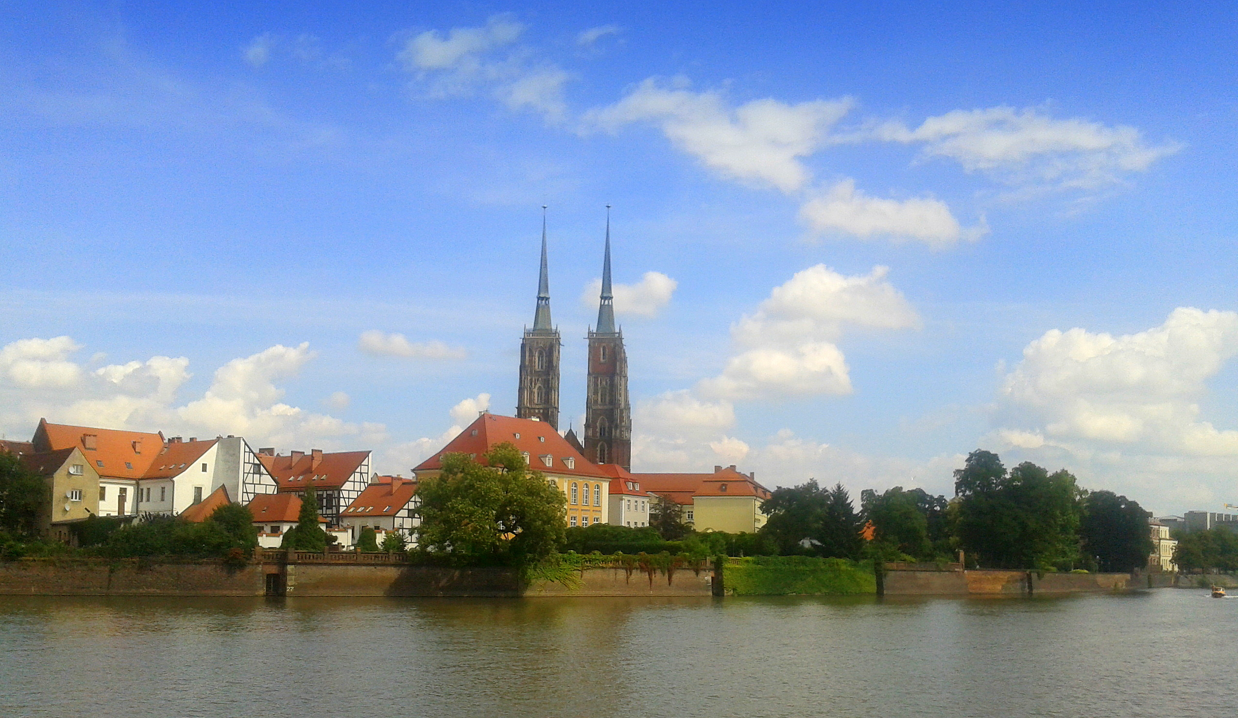 Wrocław, Ostrów Tumski